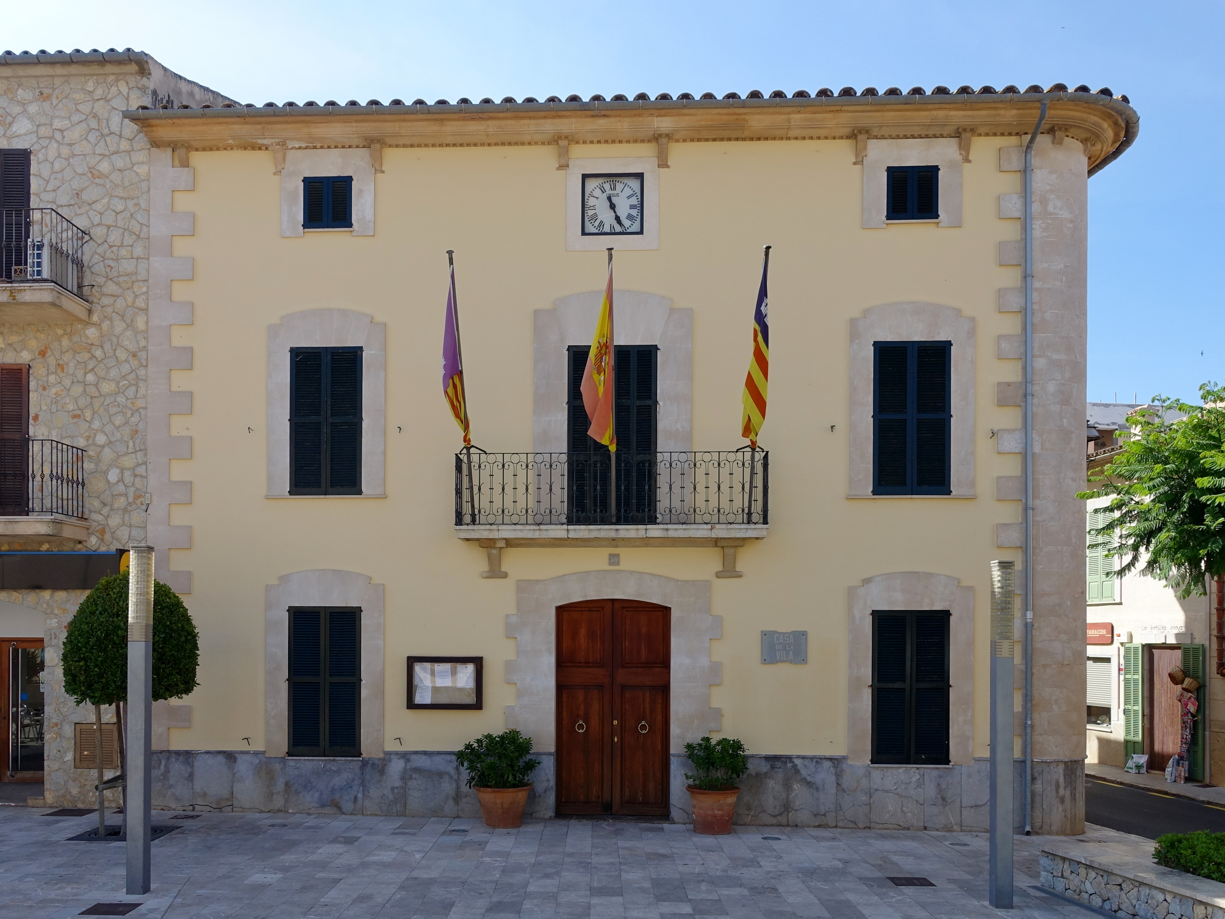 Rathaus von Costitx, Mallorca, Spanien